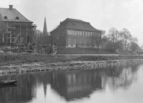 "Villa Geber" i Diplomatstaden omkring 1914, t.v. Tryggerska villan under byggnad